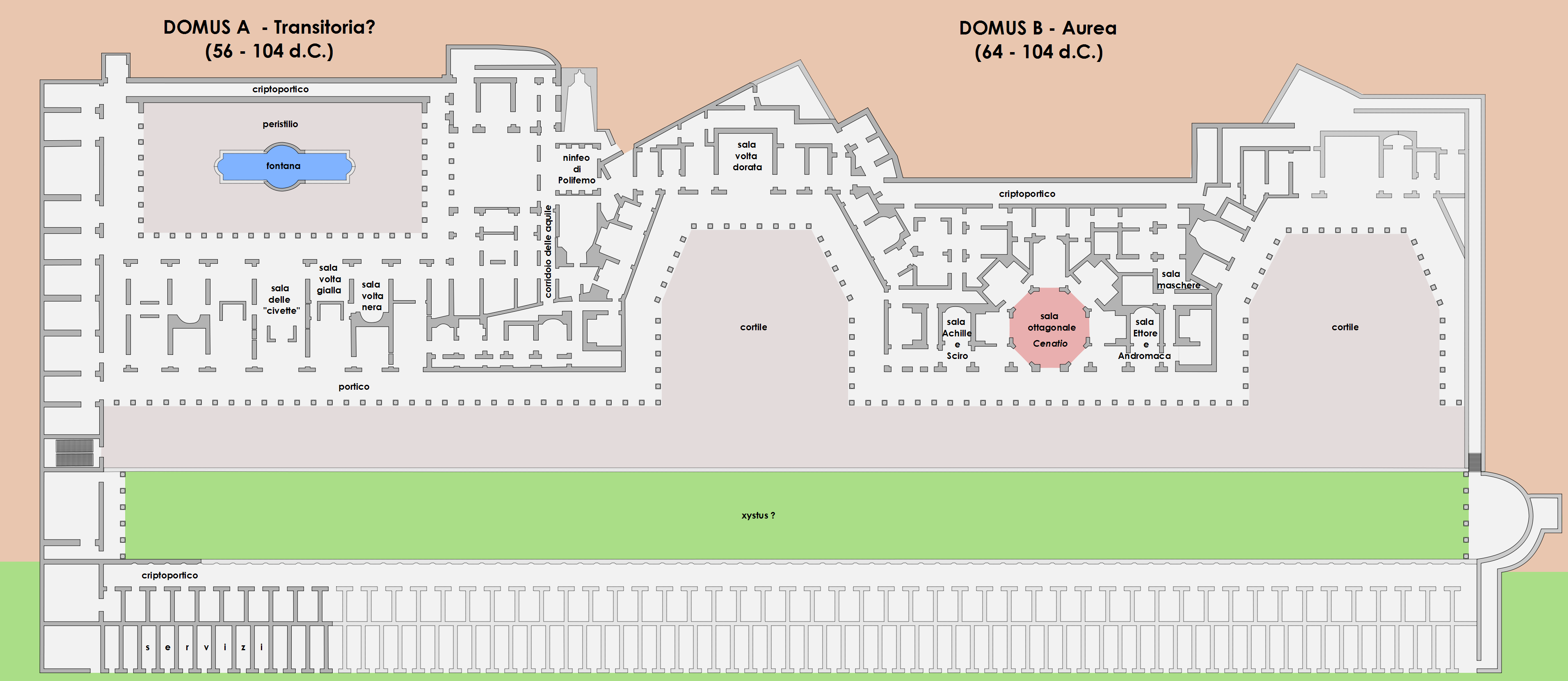 Pianta ricostruttiva del padiglione della domus Aurea sul colle Oppio